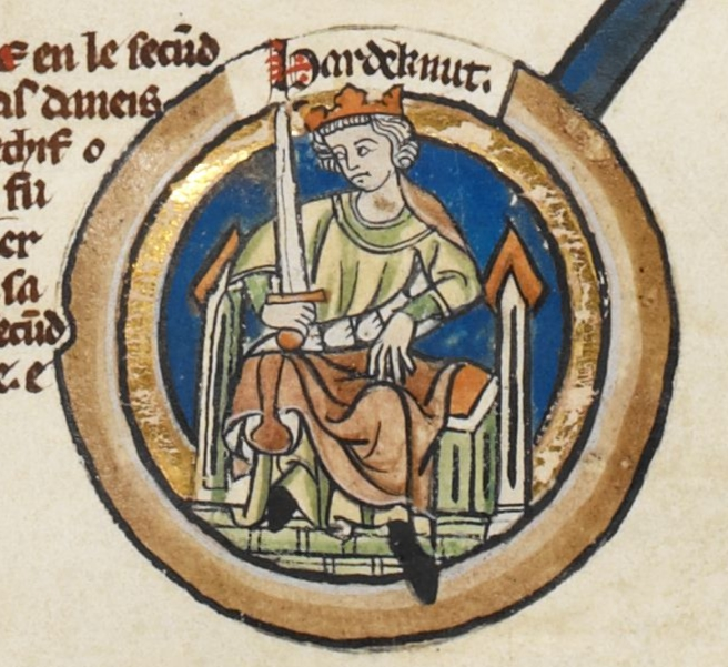 Miniature de Harthacnut dans une généalogie royale du XIVe siècle.